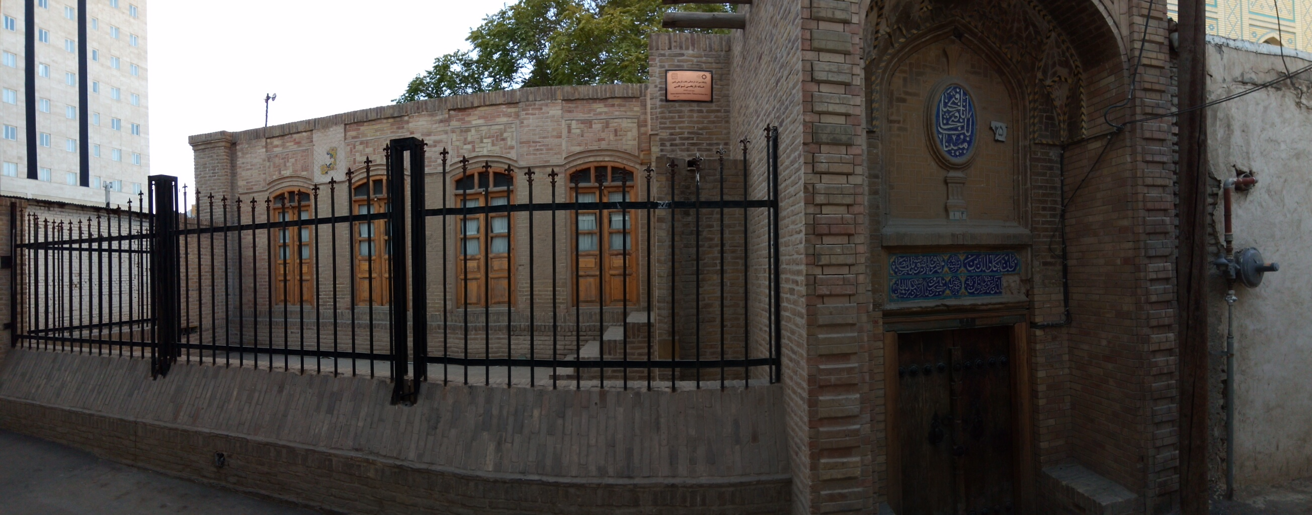 سراسرنمایی از خانه توکلی مشهد